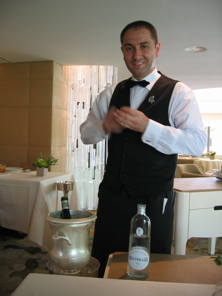 Pasquale Léonetti - Sommelier francais - Meilleur sommelier de France 2006 à l'Auberge de l'Ill de Marc Haeberlin en 2009